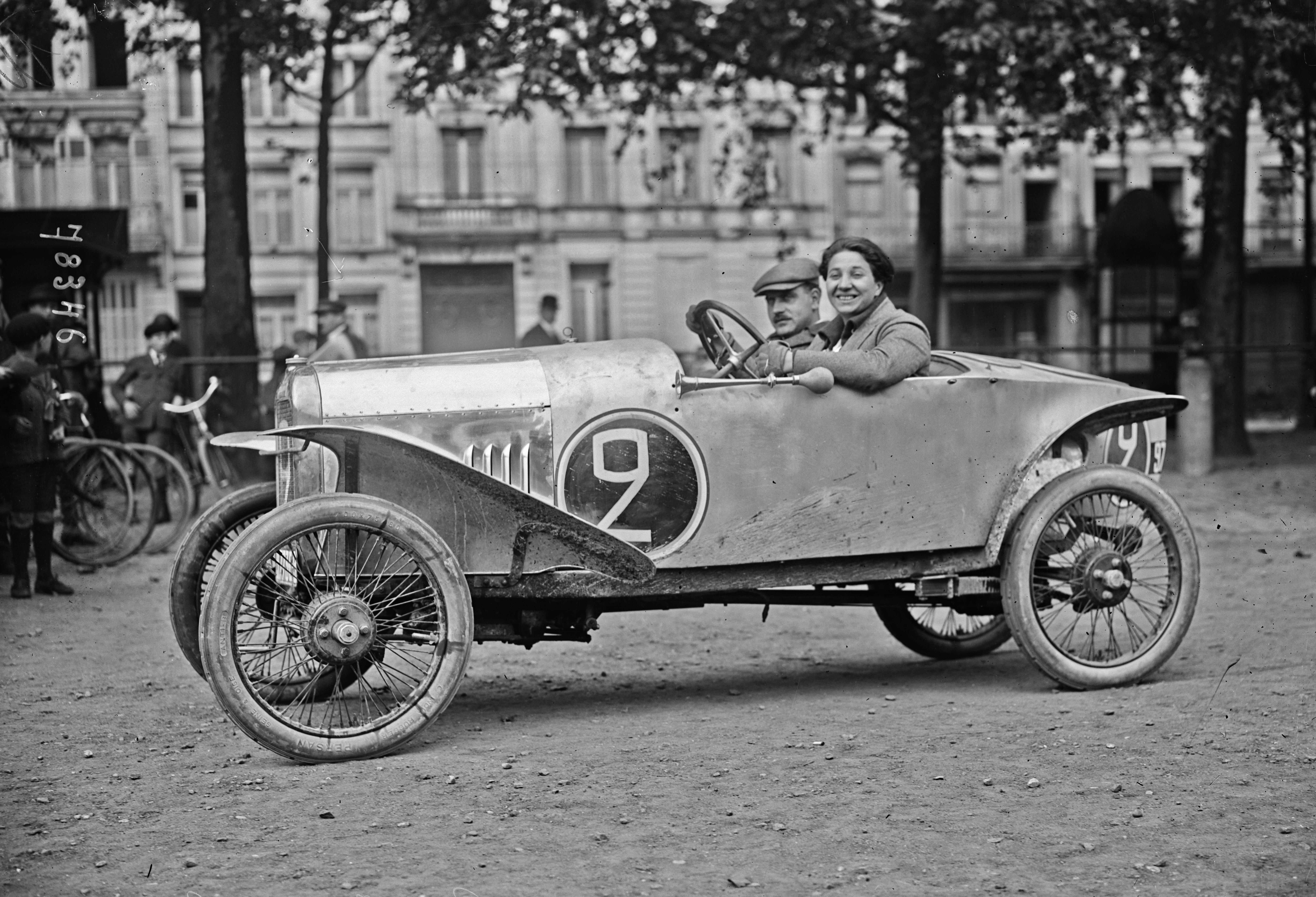 Violette Gouraud-Morris, en 1922 aux Routes pavées sur Benjamin.